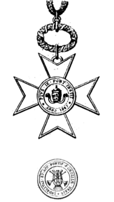 Order Świętej Cecylii